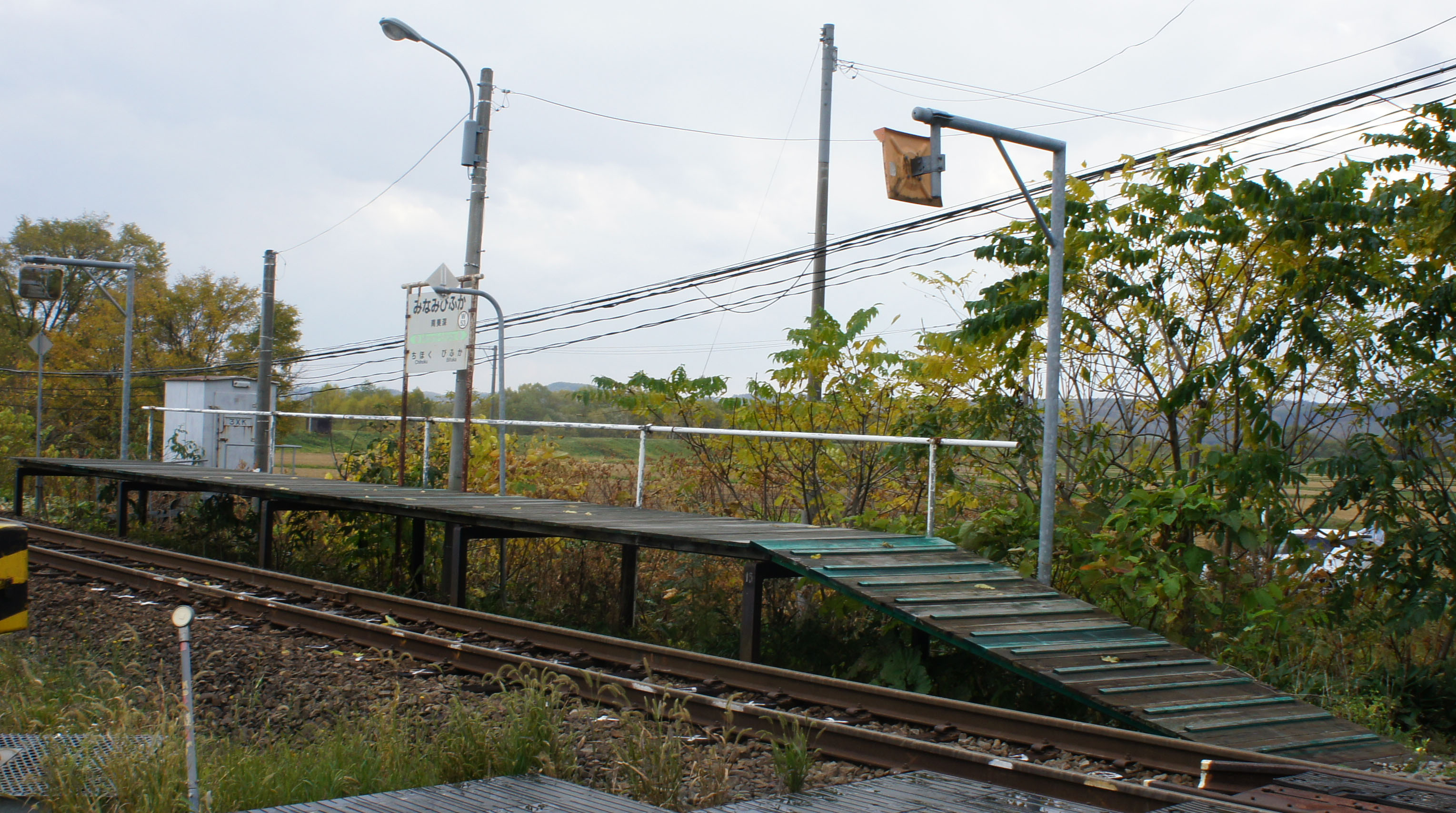 JR宗谷本線・南美深駅全体 Sony NEX-3